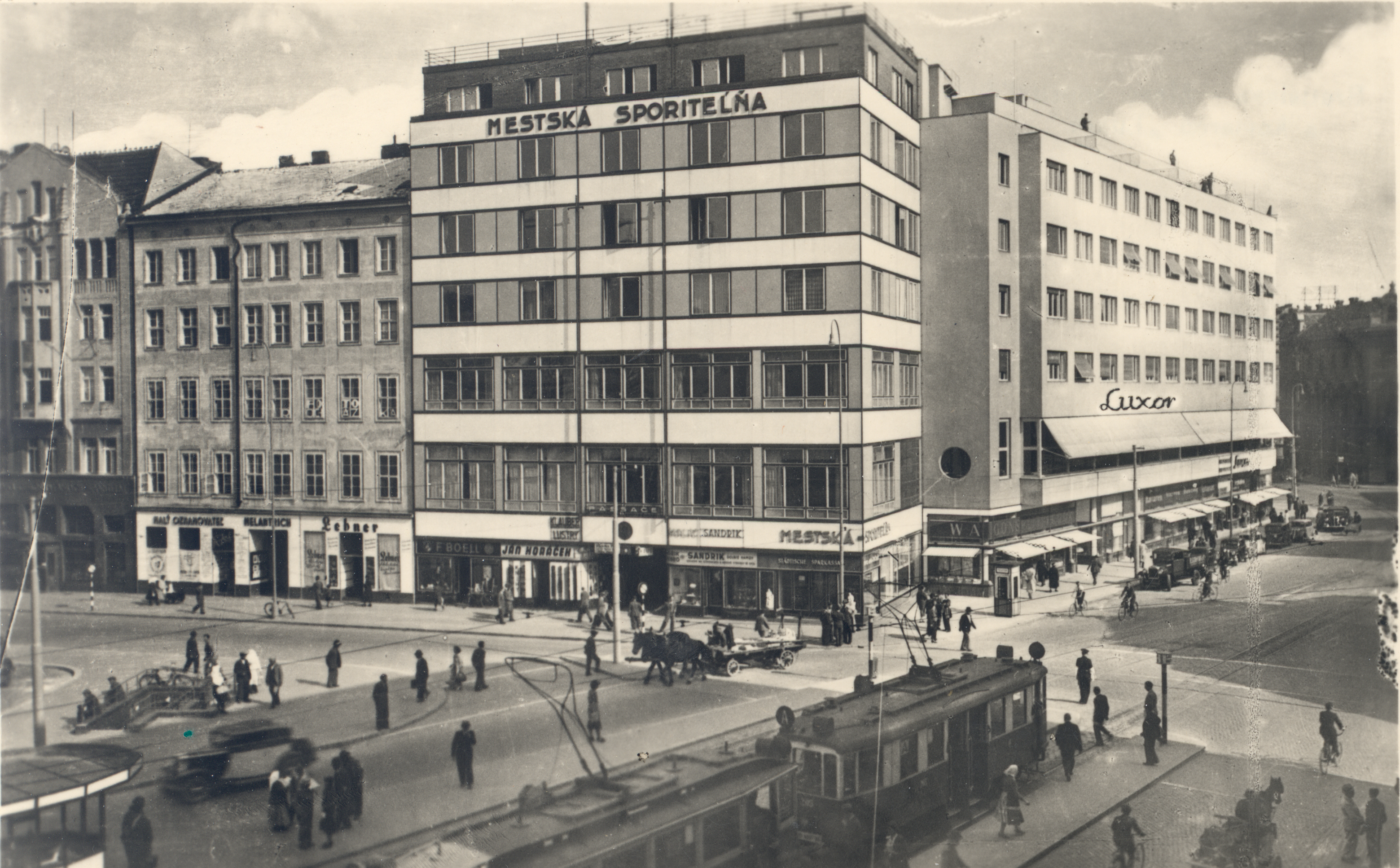 Historická budova Mestskej sporiteľne v Bratislave z roku 1931